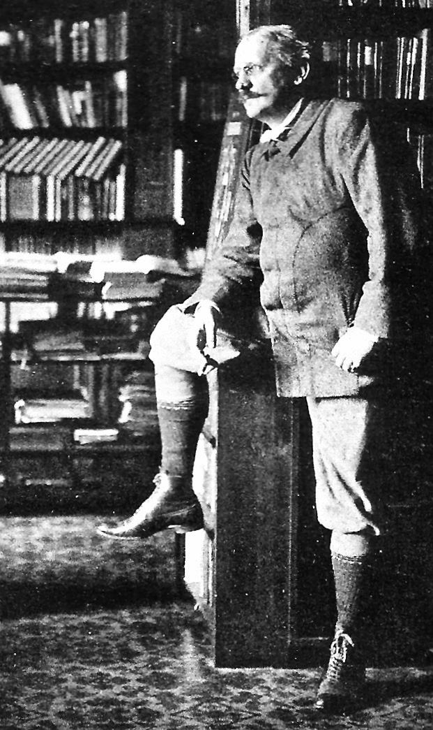 Der deutsche Journalist und Schriftsteller Fedor von Zobeltitz (1857–1934) in seiner Bibliothek auf Gut Spiegelberg in Brandenburg (Bildausschnitt)